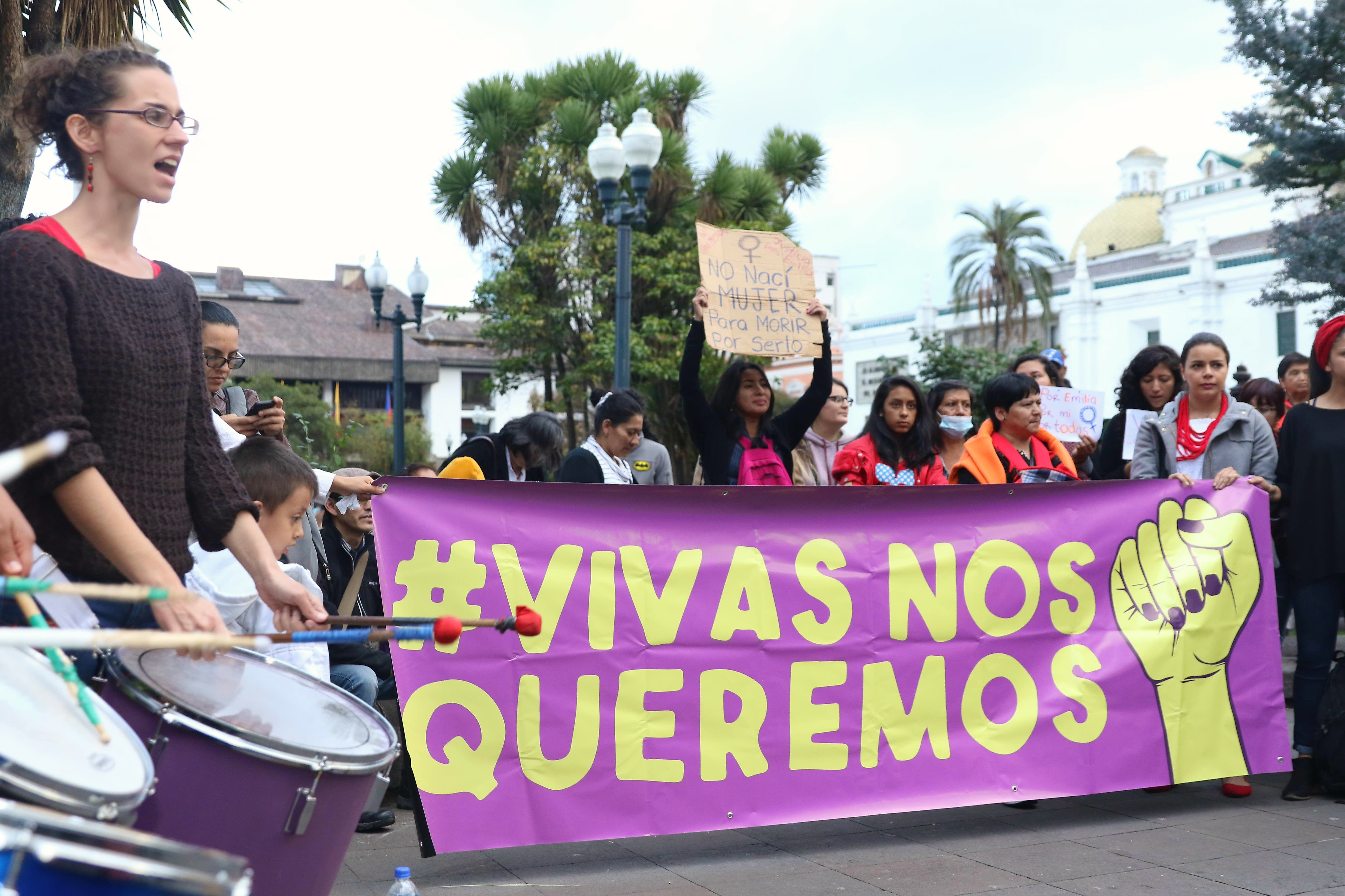 Quito, 21 de diciembre de 2017 (Andes).- Representantes de organizaciones sociales y de mujeres organizaron un plantón en rechazo a los femicidios que han ocurrido en los últimos meses. ANDES/Micaela Ayala V. PLANTÓN EN CONTRA DE LOS FEMICIDIOS Quito, 21 de diciembre de 2017 (Andes).- Representantes de organizaciones sociales y de mujeres organizaron un plantón en rechazo a los femicidios que han ocurrido en los últimos meses. ANDES/Micaela Ayala V.